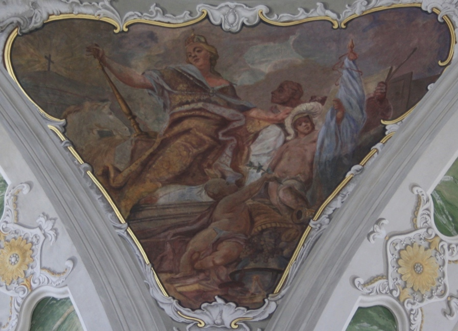 Zwickelbild in der Jesuitenkirche in Mannheim. Darstellung: Europa